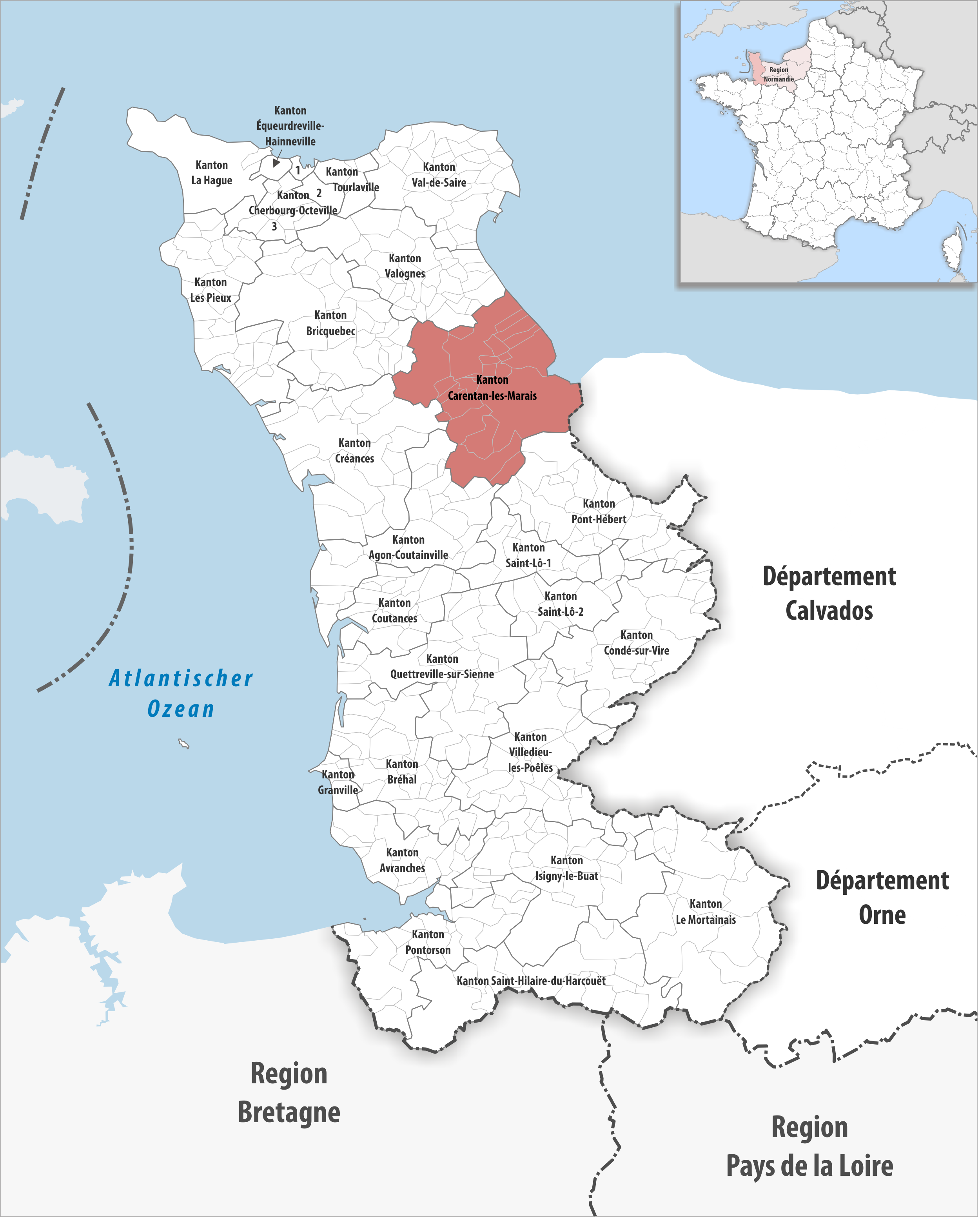 Lage des Kantons Carentan